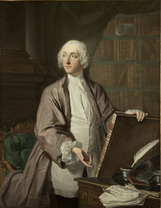 Der französische französischer Volkswirt (Physiokrat) und Schriftsteller und Vater des Revolutionärs Victor Riquetti Marquis de Mirabeau